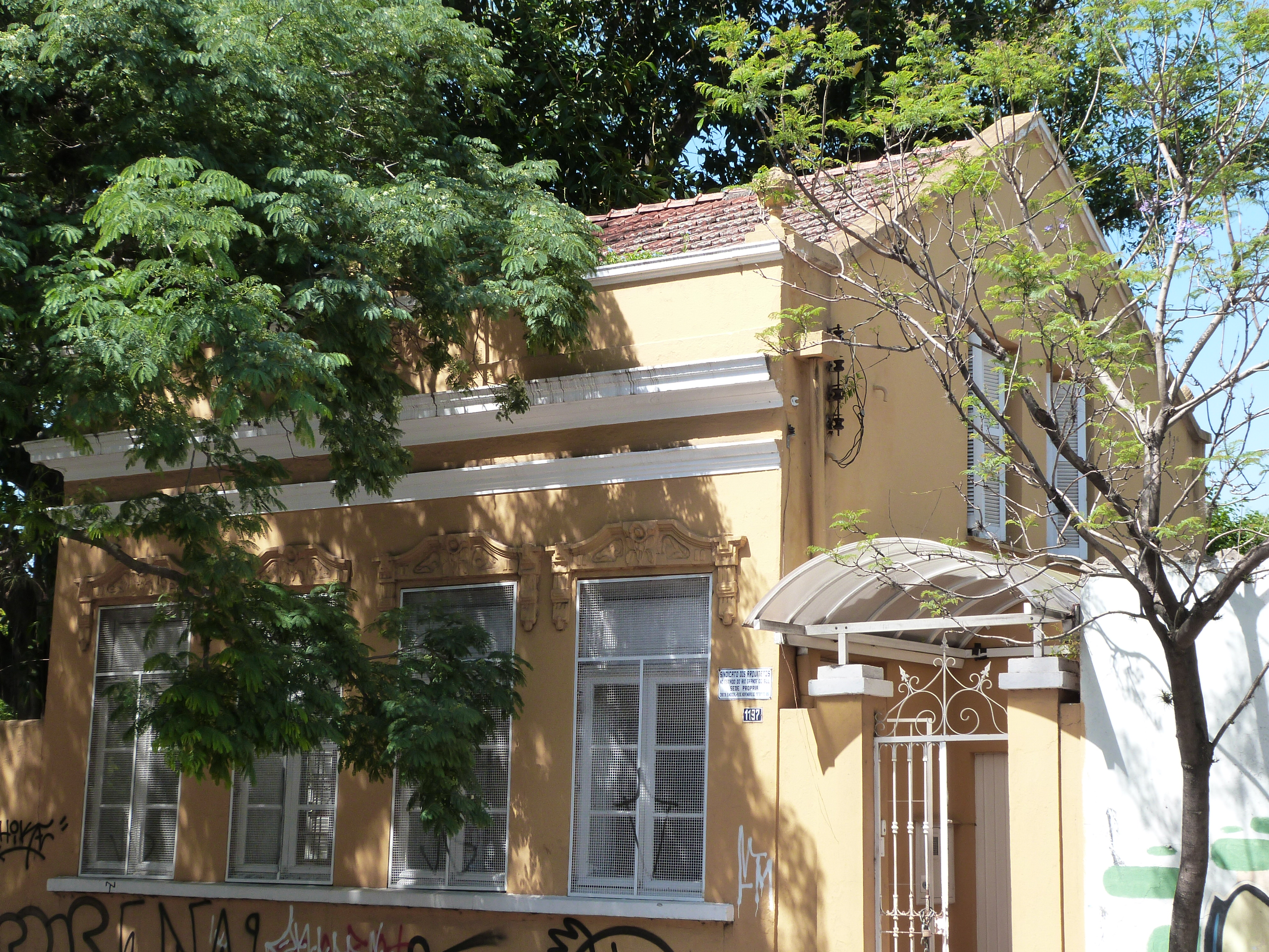 Sede do SAERGS na Rua José do Patrocínio, Porto Alegre - RS.